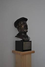 Busta_Heinrich Neumann von Héthárs